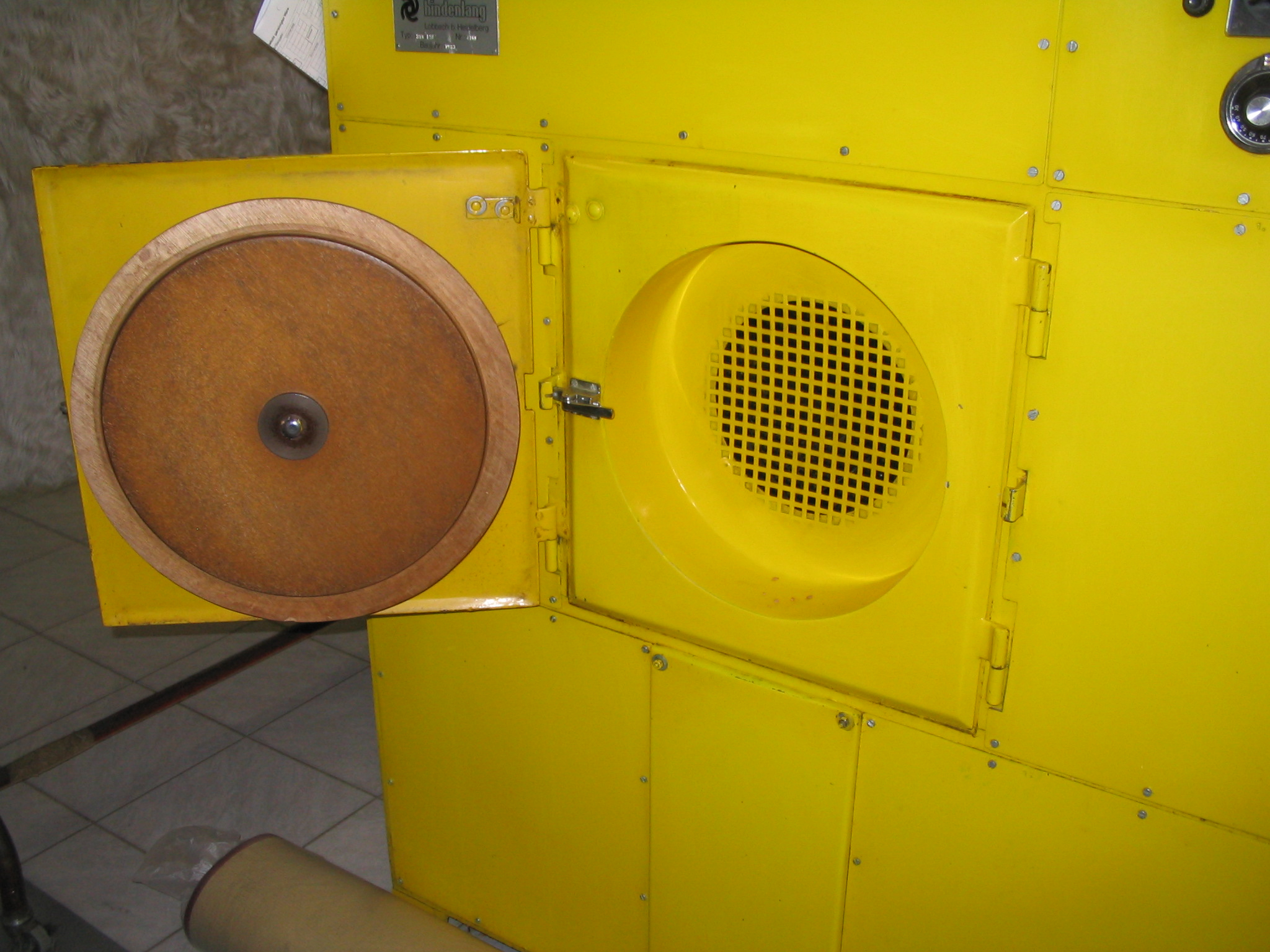 Pelz-Läutertonne mit Luftdurchlass beim Schütteln mit Absaugen. Hersteller Maschinen - Ofenbau Hindenlang, Lobbach b. Heidelberg. Typ 310 LSF, Baujahr 1988 gesehen in der Firma Lederreinigung Dieter, Höninger Weg 107, 50969 Köln-Zollstock Inhaber: Theodoro Saracino. Lederreinigung, Leder-Möbelreinigung, Lederfärberei, Pelzreinigung